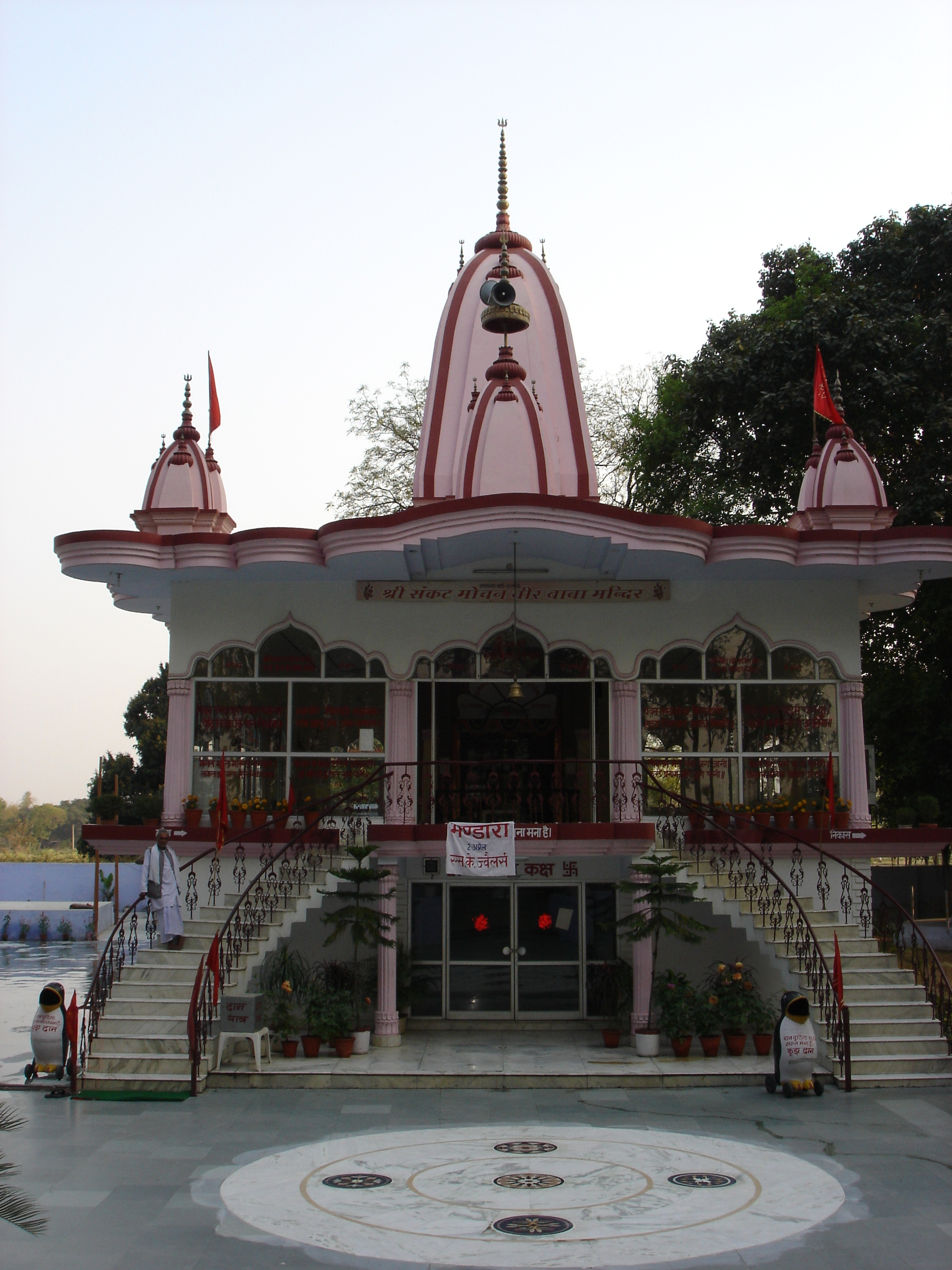 Sankat Mochan Hanuman Temple in Varanasi, India. (on Lakhimpur baharaich Road)